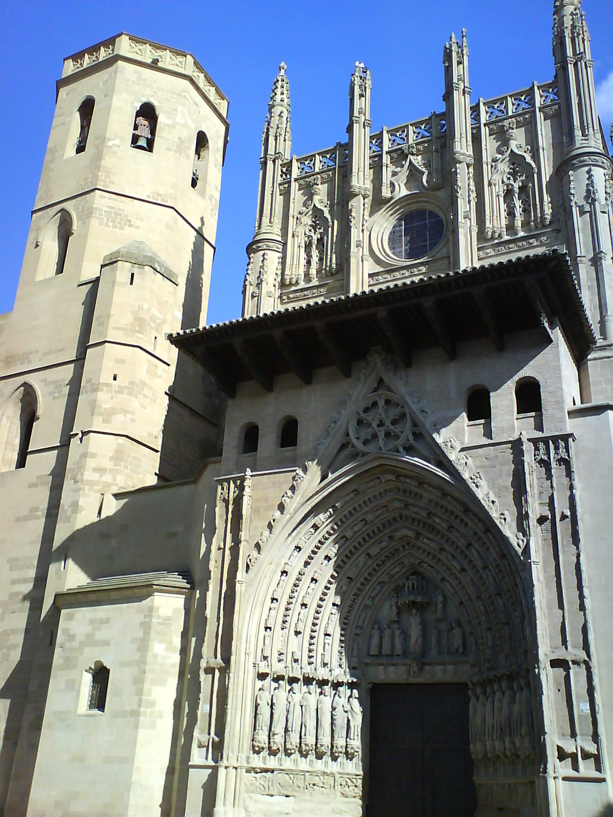 La catedral de Huesca en un fantástico día de Sol. Tirada por Sérgio Luís A.C.R. Gomes